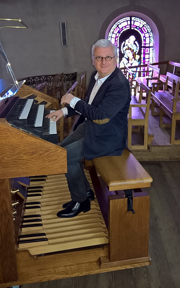 Eric Humbertclaude à l'orgue. Photo prise en juin 2017 à l'orgue de l'église Saint-Laurent (La Bresse, Vosges)